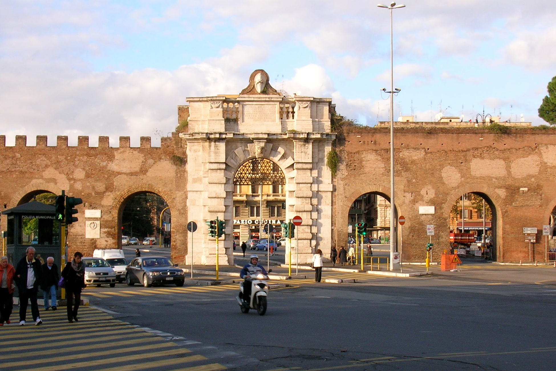 Vue large de la Porta San Giovanni Roma